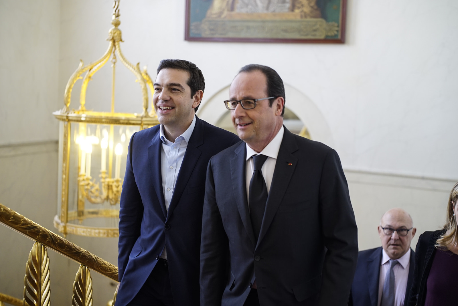 _DSC7946